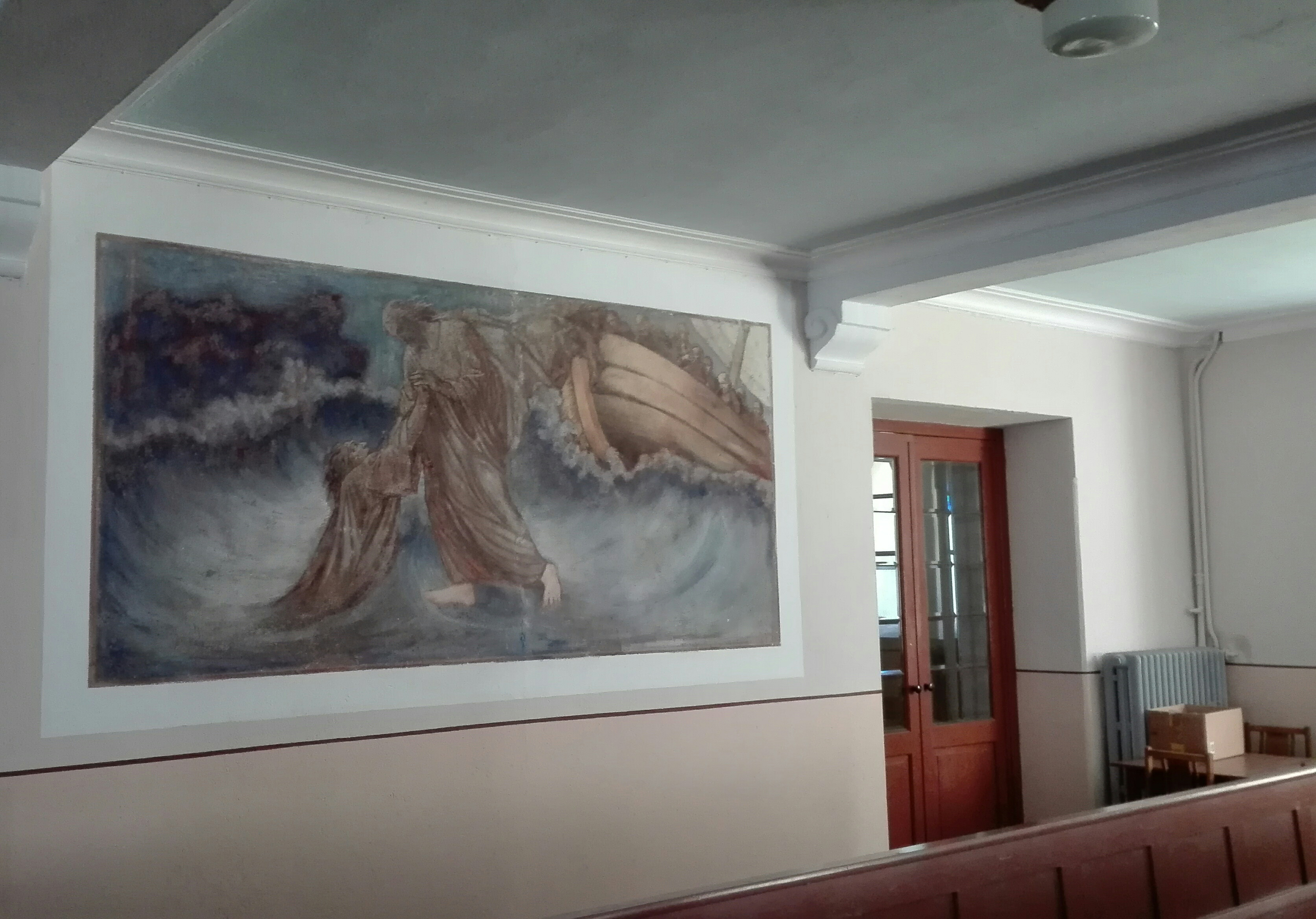 Šilutės evangelikų liuteronų bažnyčios freska